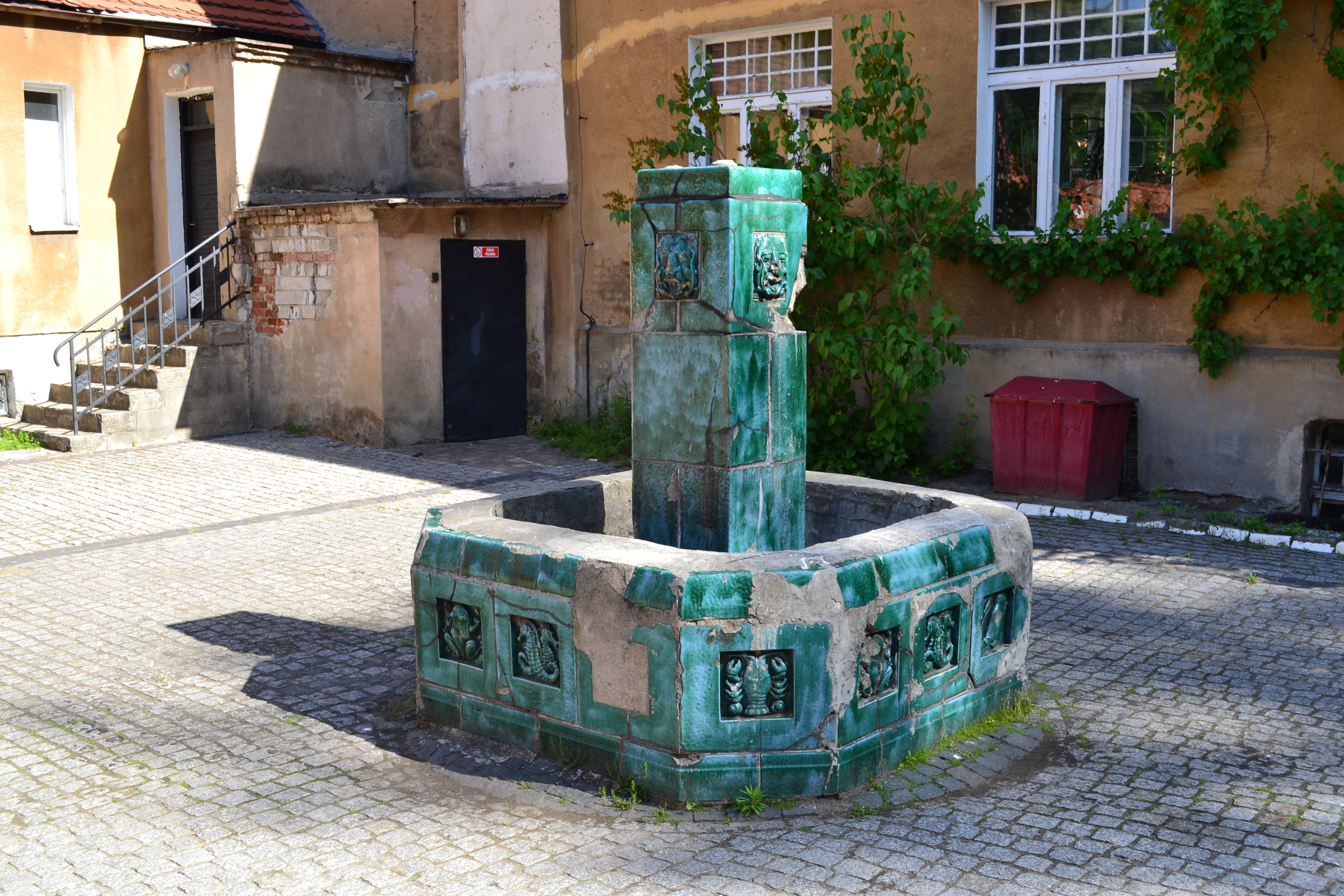 Pałacyk pod Lwami; Gryfino ul. Bolesława Chrobrego 48